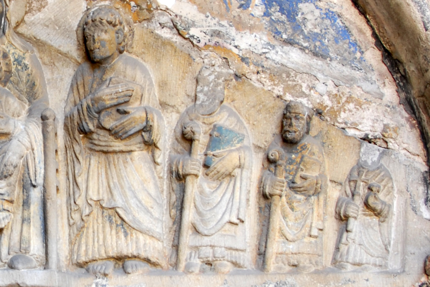 Mozat, südl. Querhaus, Portalsturz, rechts der Mitte